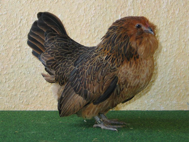 0,1 Antwerpener Bartzwerg - wachtelfarbig